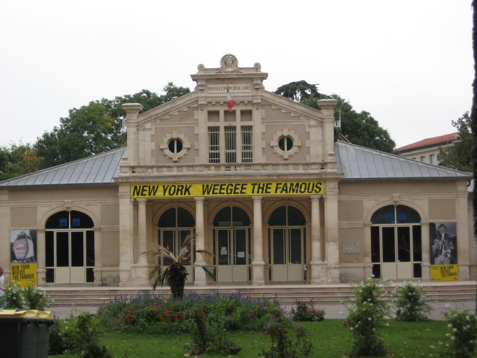 Pavillon populaire de Montpellier (France) accueillant une exposition des photographies de Weegee